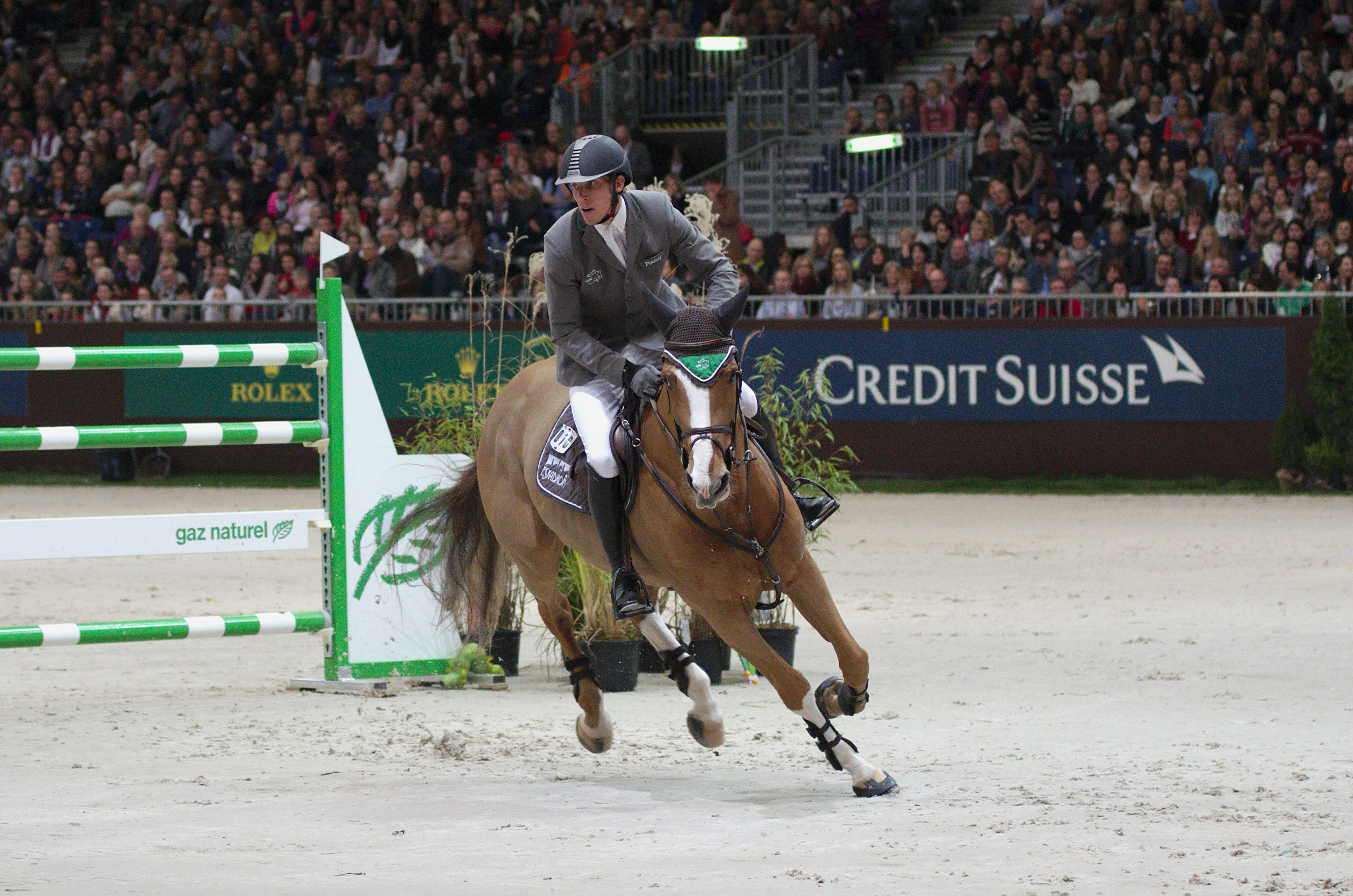 54eme CHI de Genève - 20141213 - Coupe de Genève - Henrik Von Eckermann et Gotha